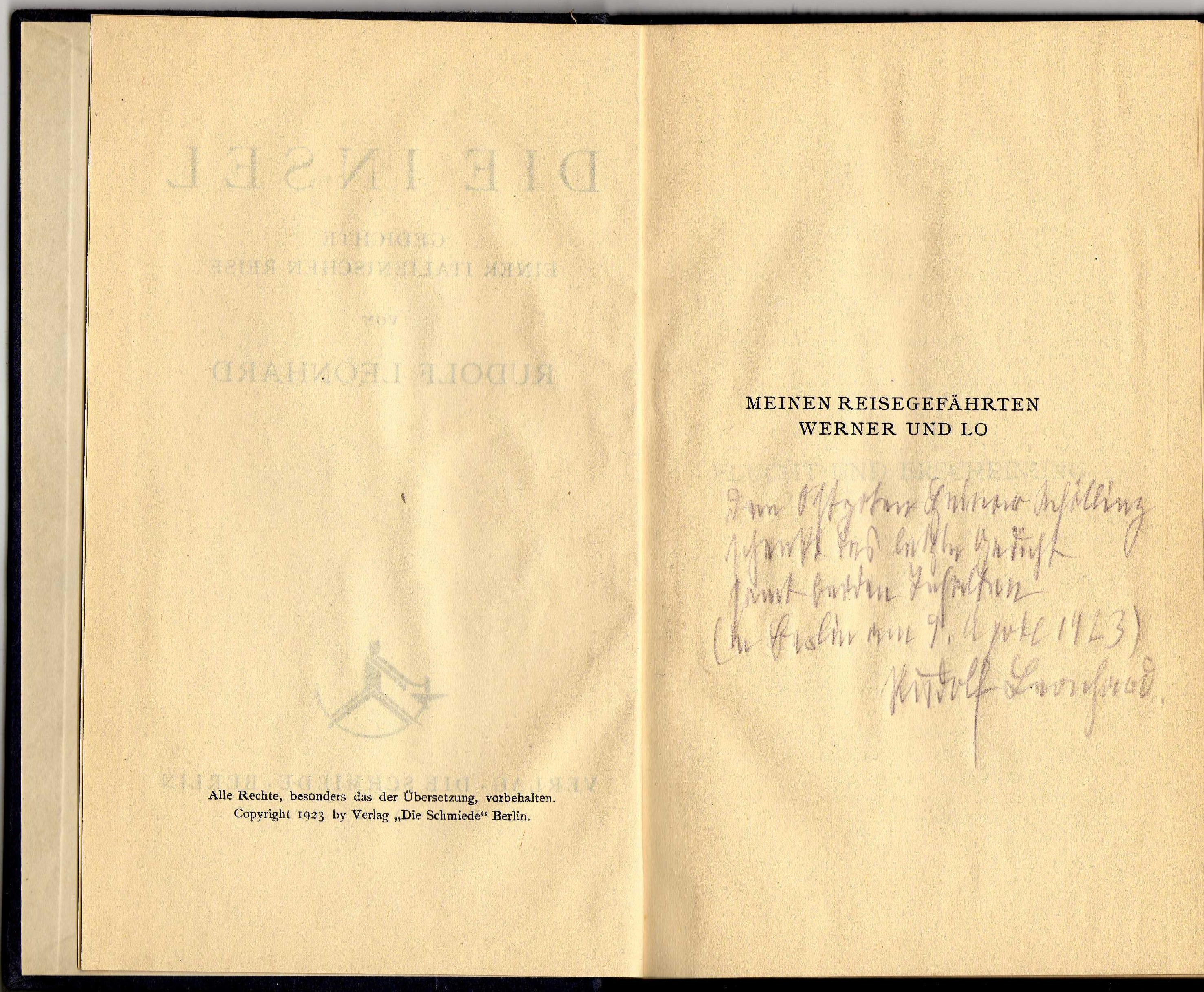 Widmung Leonhards